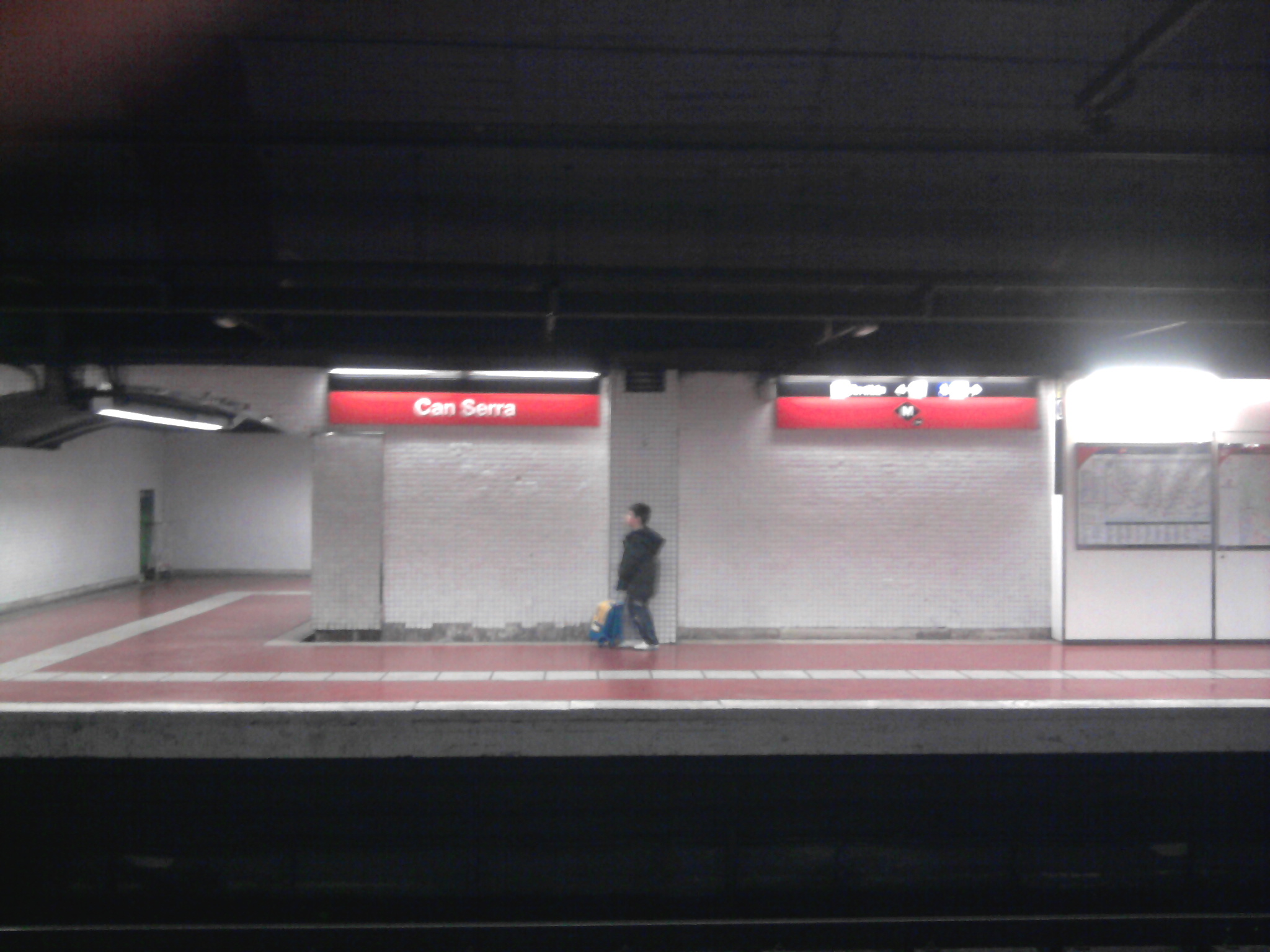 Foto capturada per la meva càmara a l'estació de Can Serra (Metro de Barcelona).